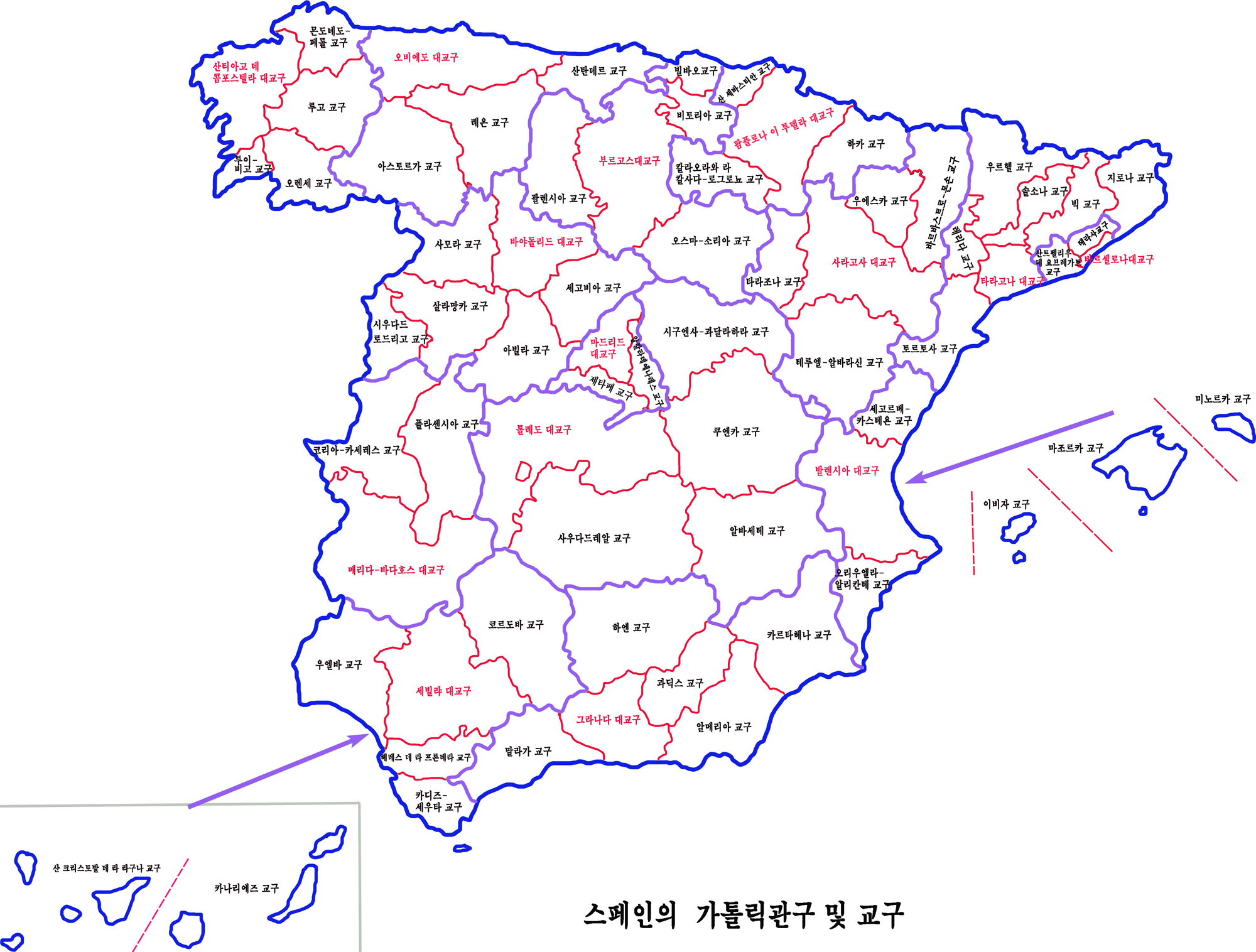 스페인 로마가톨릭구역도